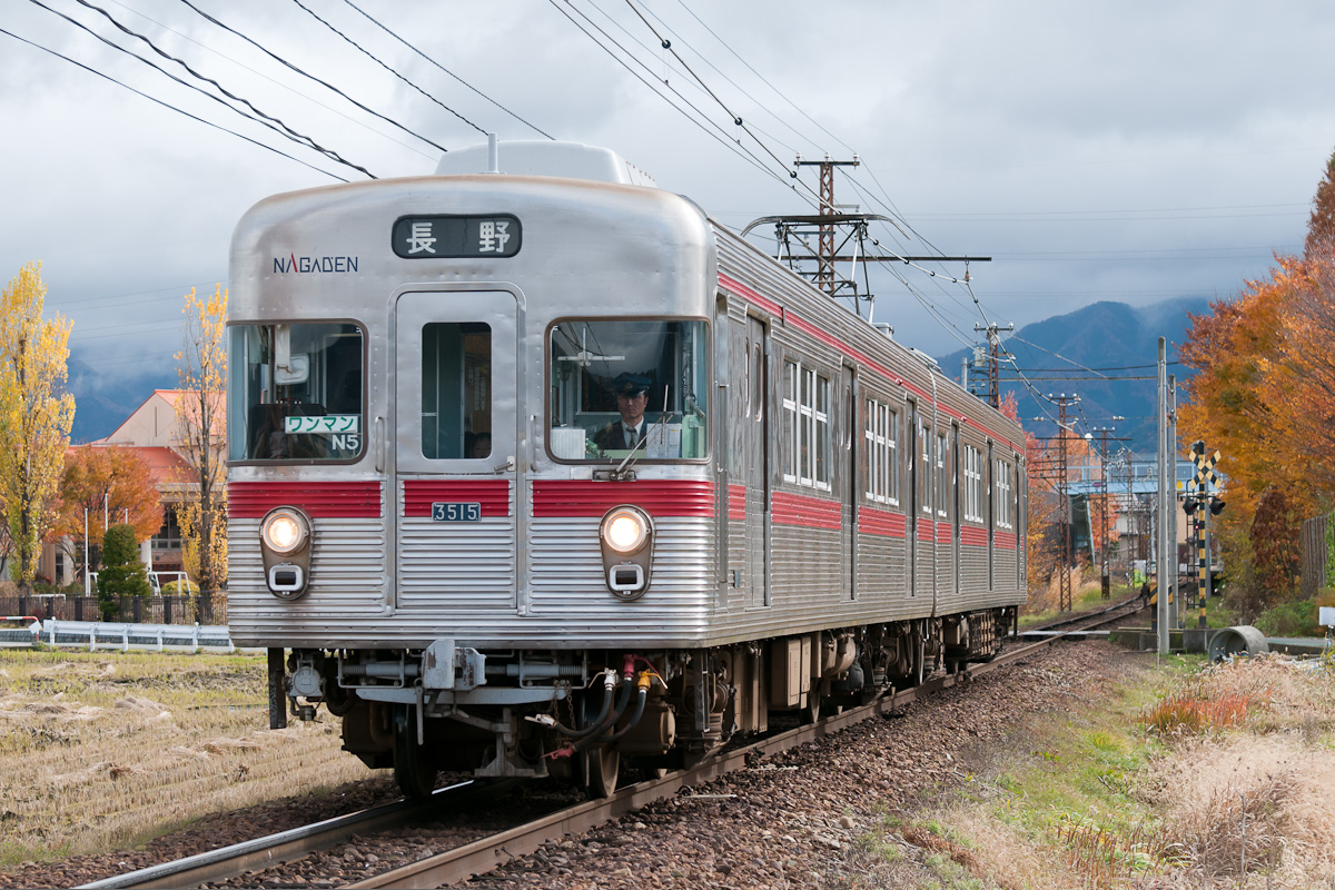 長野電鉄3500系、朝陽 - 付属小学校前。